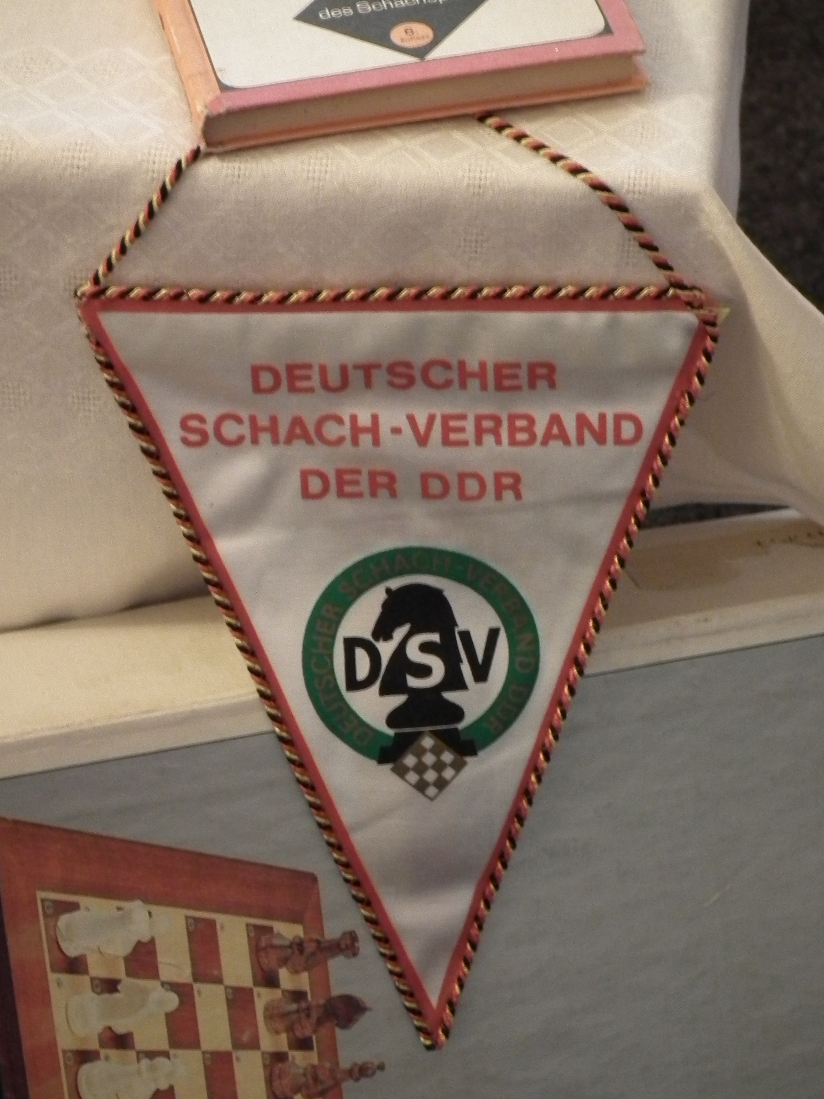 DDR Museum Zeitreise Radebeul, Wimpel Deutscher Schach-Verband der DDR, Fotografiert mit Genehmigung der Museumsleitung